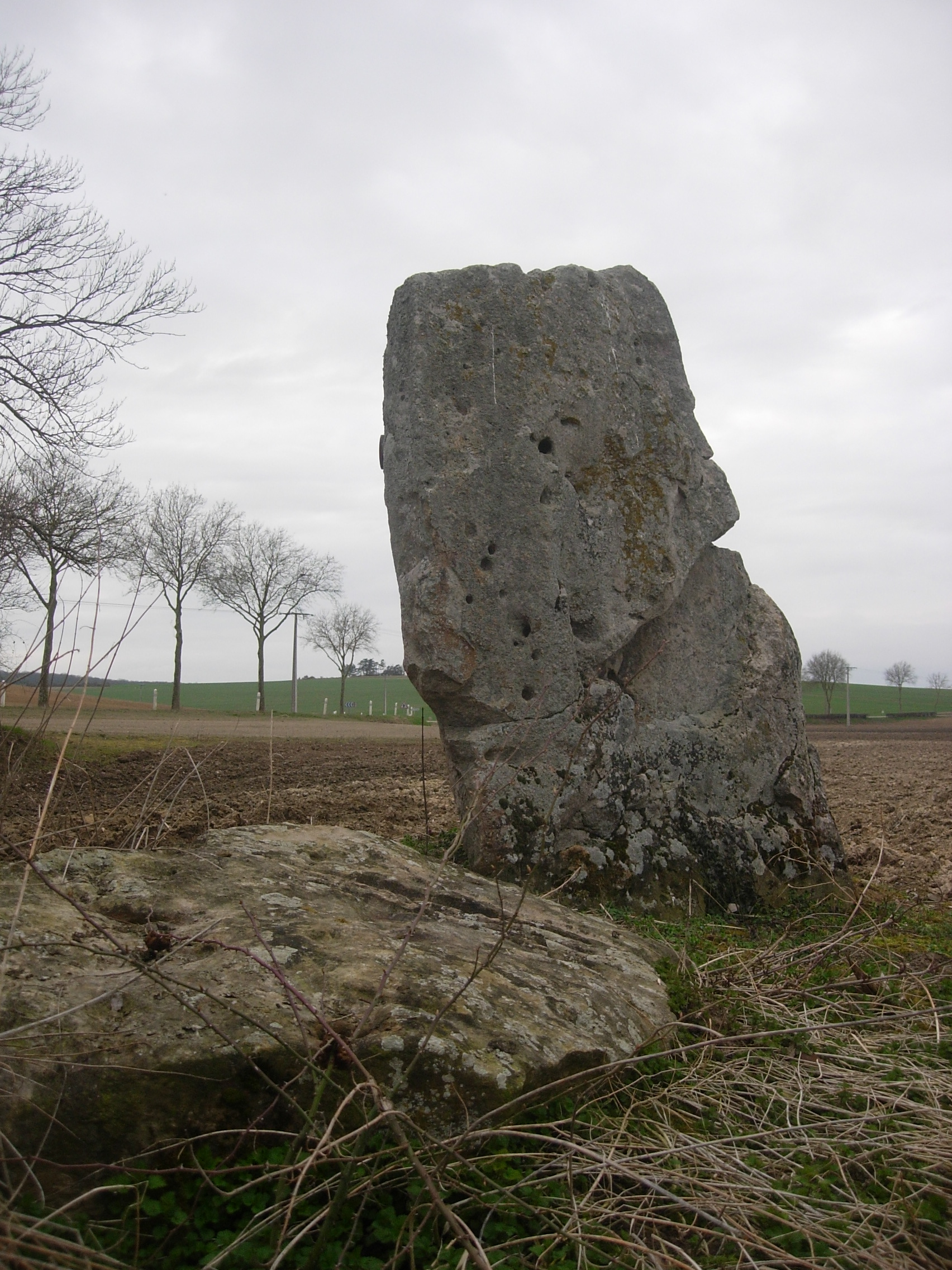 Soligny-les-Etangs : le menhir de la Pierre au coq et le polissoir néolithique